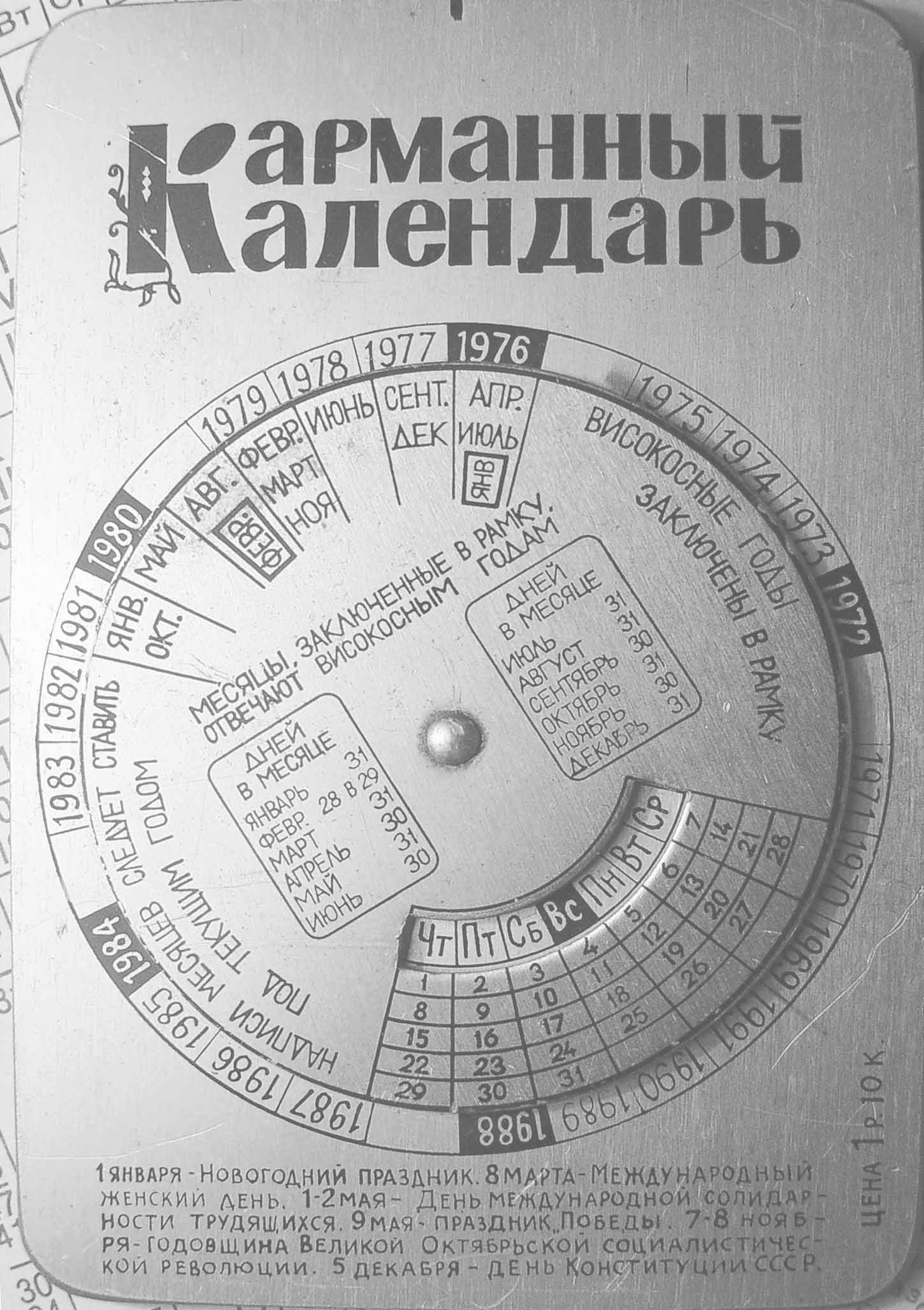 Aluminium Pocket Perpetual Calendar, Cheljabinsk, Russia, after 1969